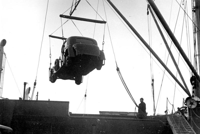 Riga, Umsiedlung, Verladen eines Autos Riga Rückführg. / Gepäck 39/40 Der Dienstwagen muss mit. Fotograf: A. Frankenstein [Riga.- Umsiedlung deutschstämmiger Balten, Verladung eines Dienstautos von einem Schiff.]